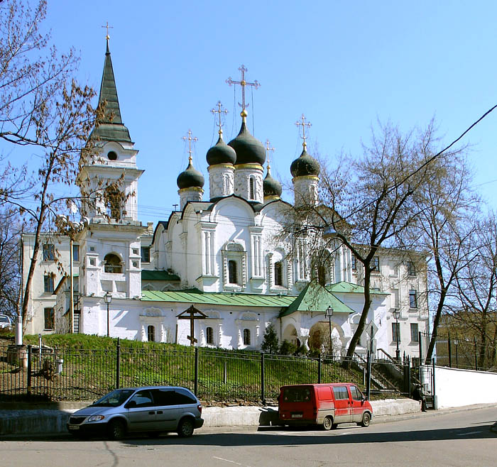 Moscow, church of st. Vladimir across from Ivanovsky ConventМосква. Церковь св. Владимира в Старых Садах, Хохловский переулок (напротив входа в Ивановский монастырь)